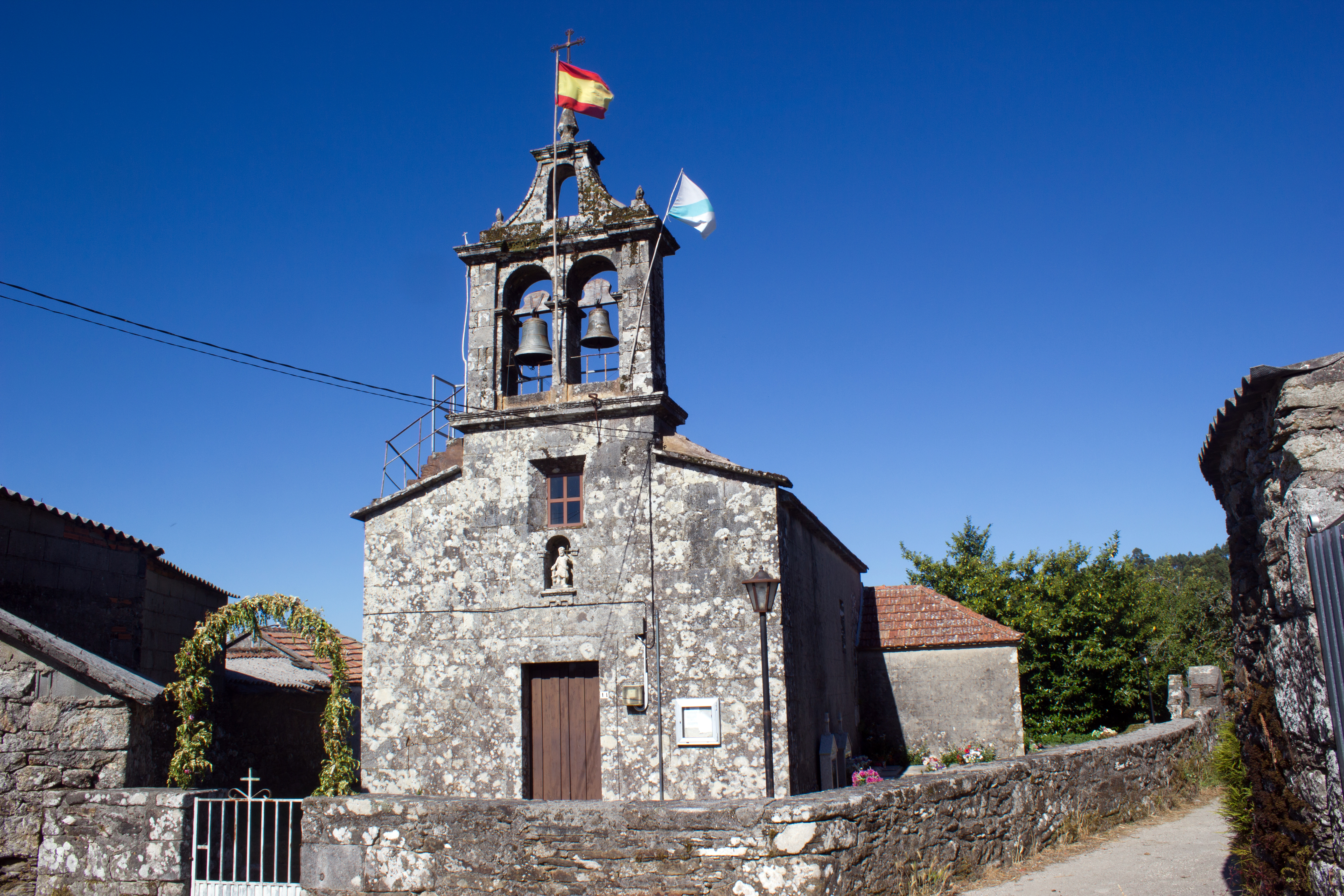 Igrexa de San Xoán Bautista de Liripio, no concello da Estrada.